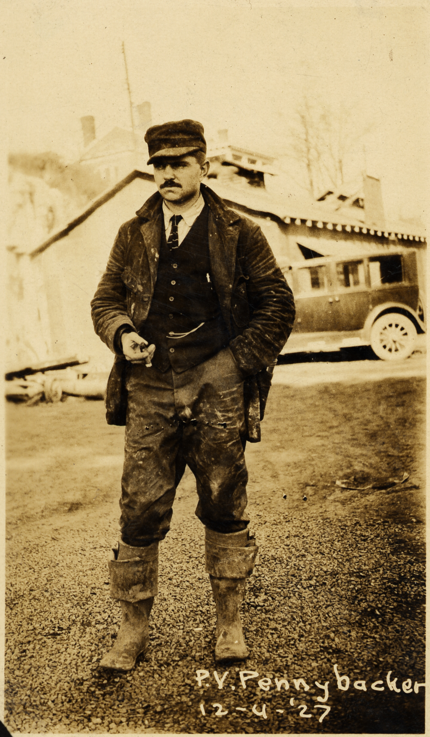 Cape Girardeau, MO - 1927